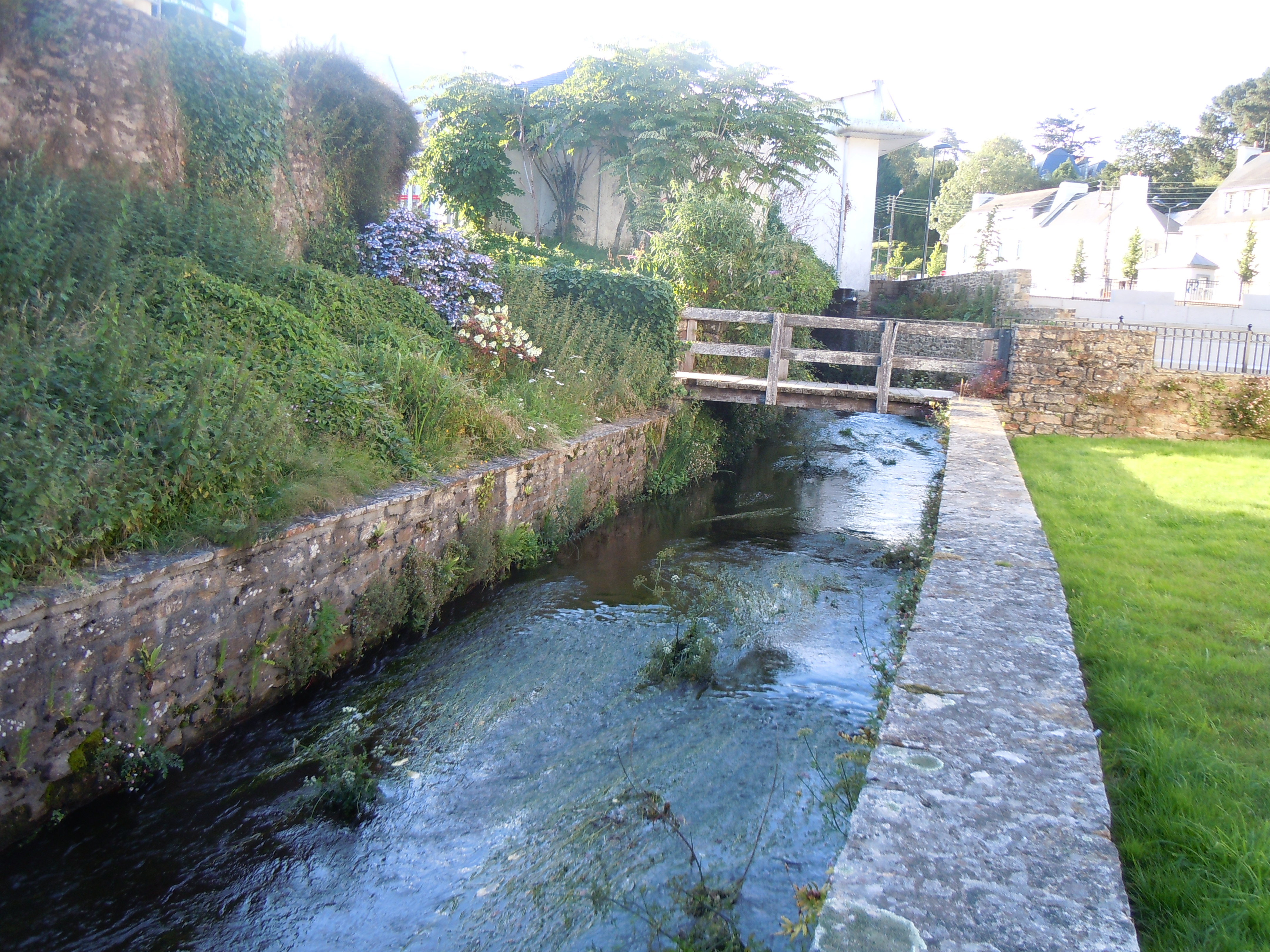 la rivière le Dourdu dans la ville de Quimperlé (département du Finistère).